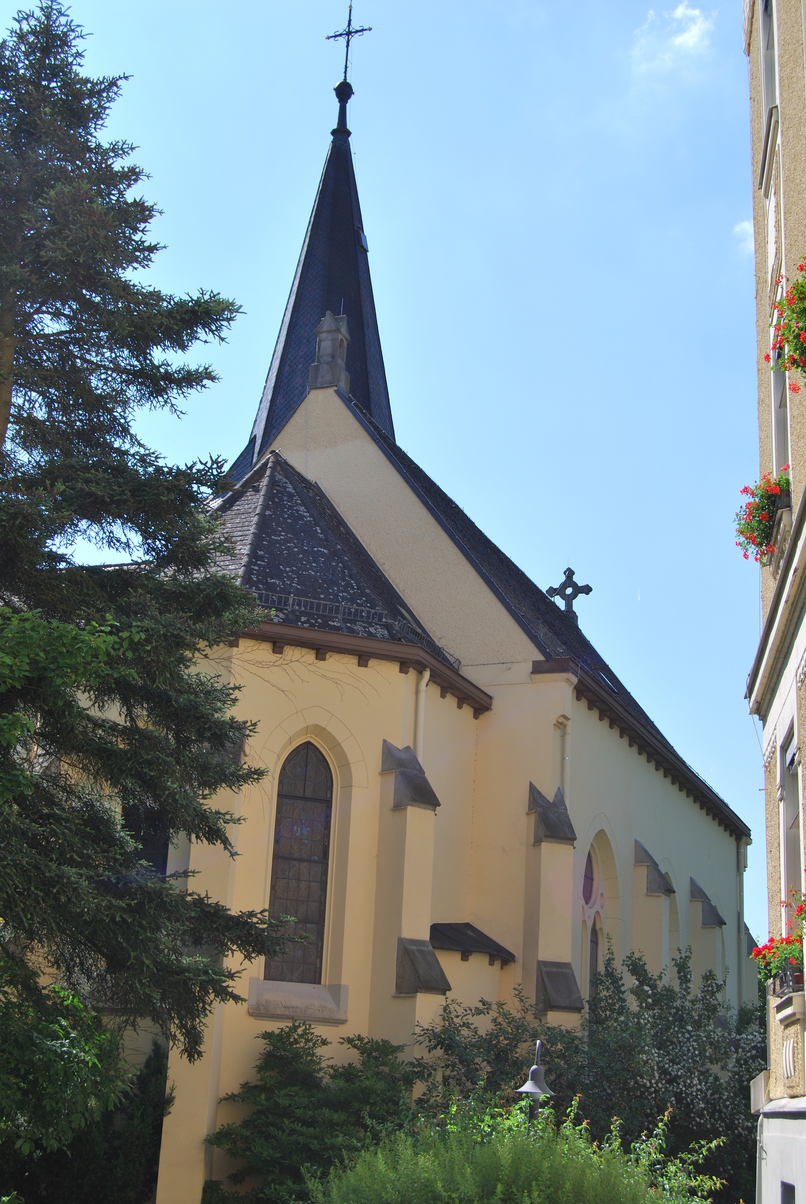 Die Evangelische Christuskirche in Gallneukirchen.